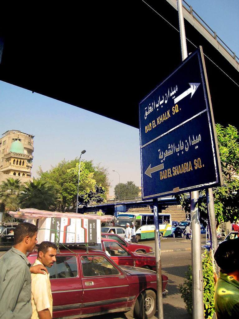 Choose ur way by 2 ways